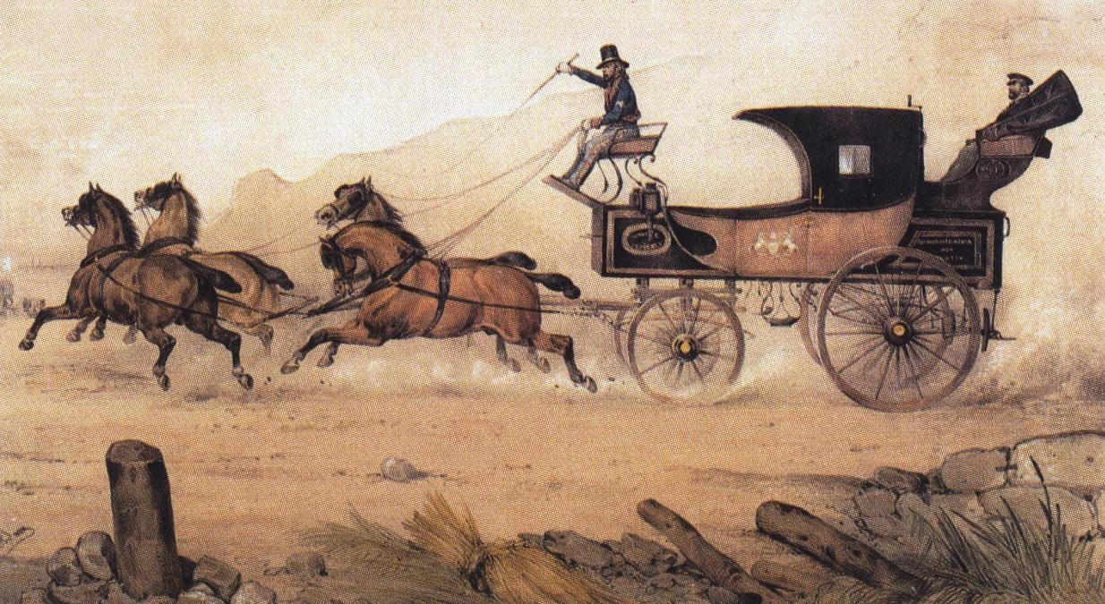 Malle-Poste, Modell Briska géint 1839. Lithographie vum Victor Jean Adam, am Musée national de la Voiture et du Tourisme zu Compiègne.